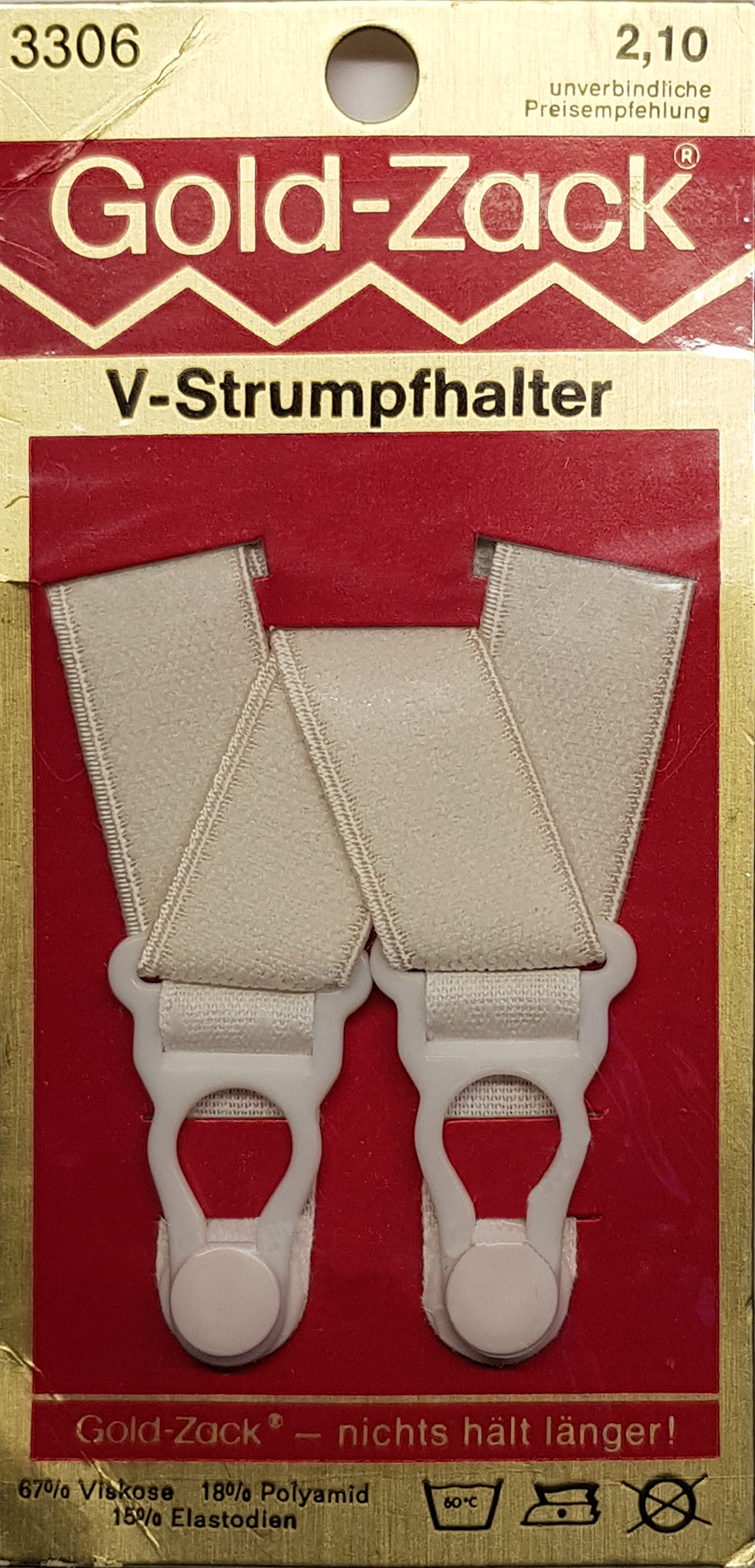 V-Strumpfhalter von Gold-Zack. 2,10 DM unverbindliche Preisempfehlung vor 1984.